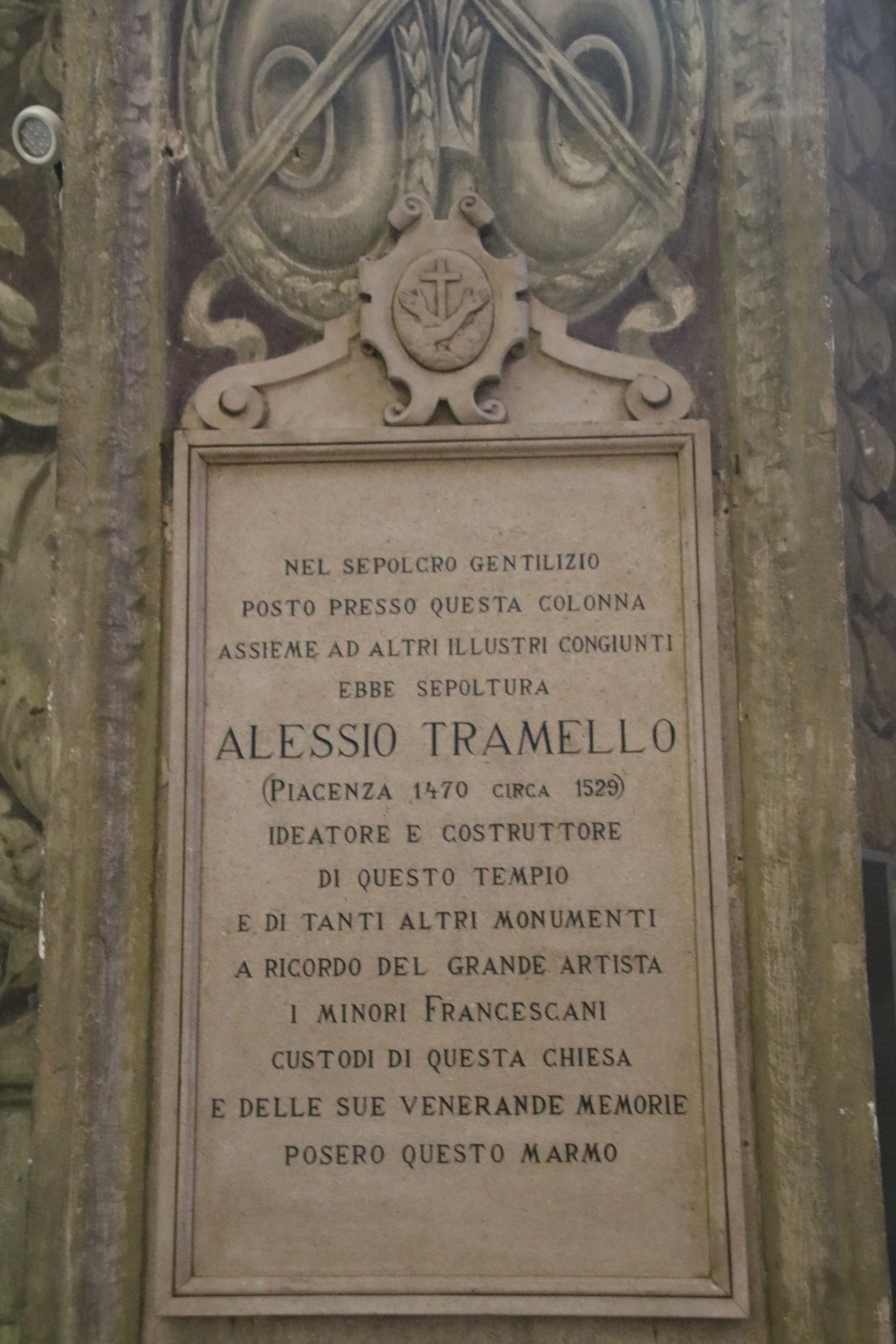 basilica di Santa Maria di Campagna This is a photo of a monument which is part of cultural heritage of Italy.